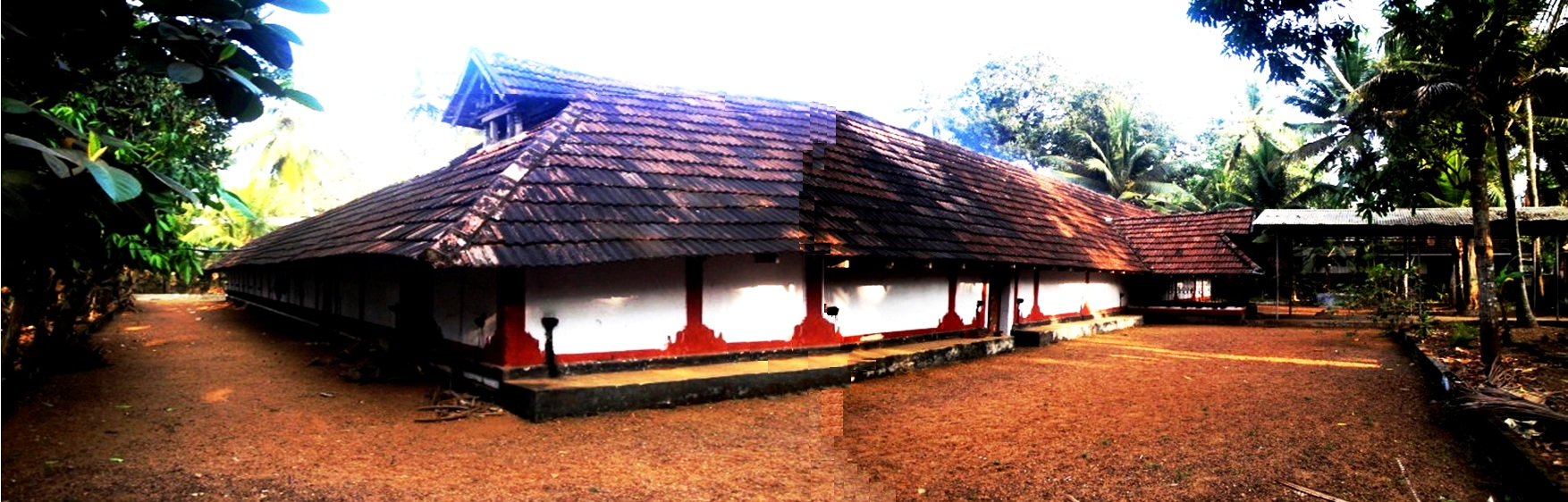 തിരുവല്ല തിരുവാറ്റാ മഹാദേവക്ഷേത്രം